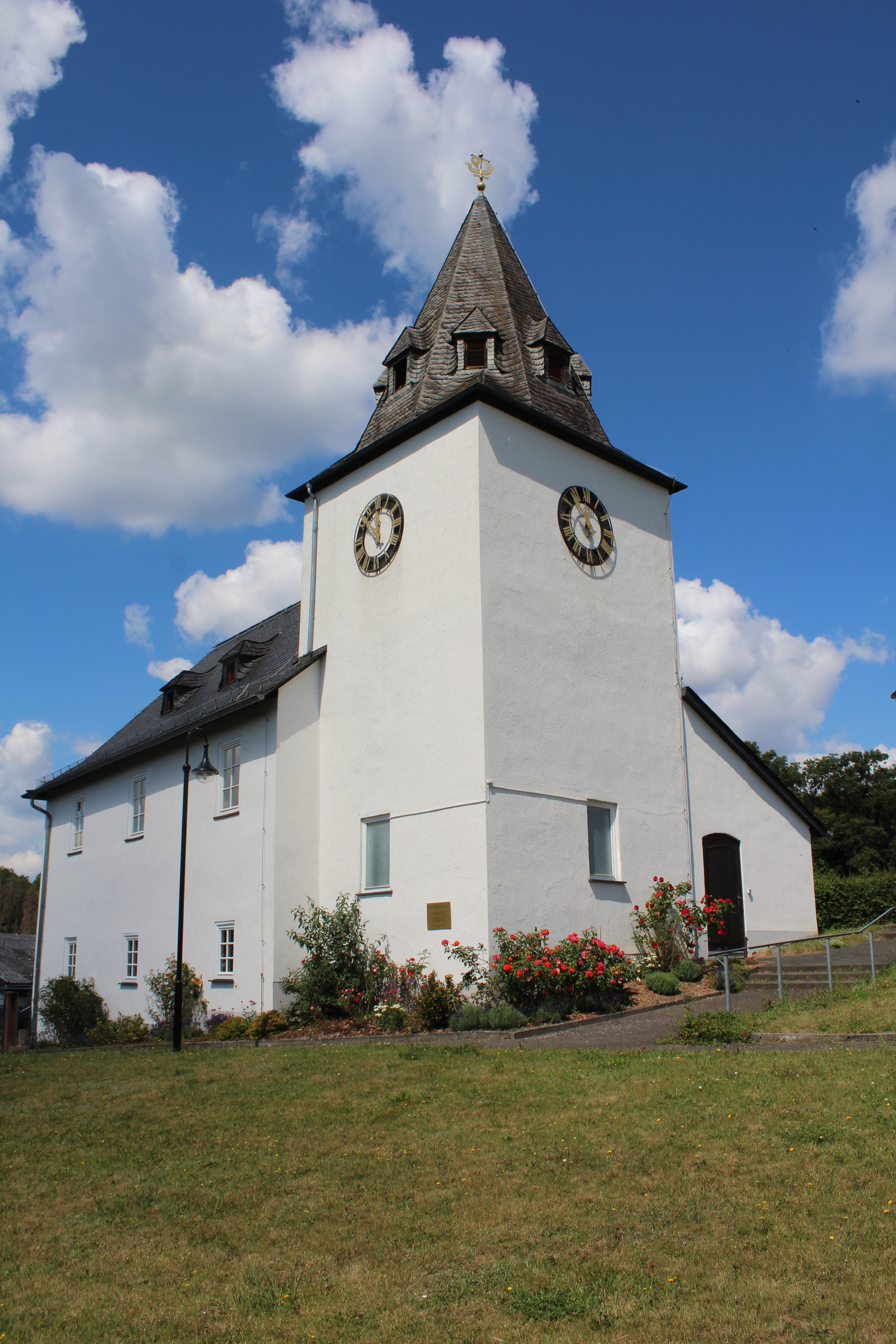 Evangelische Kirche Neukirchen, Braunfels, Lahn-Dill-Kreis, Hessen, Deutschland